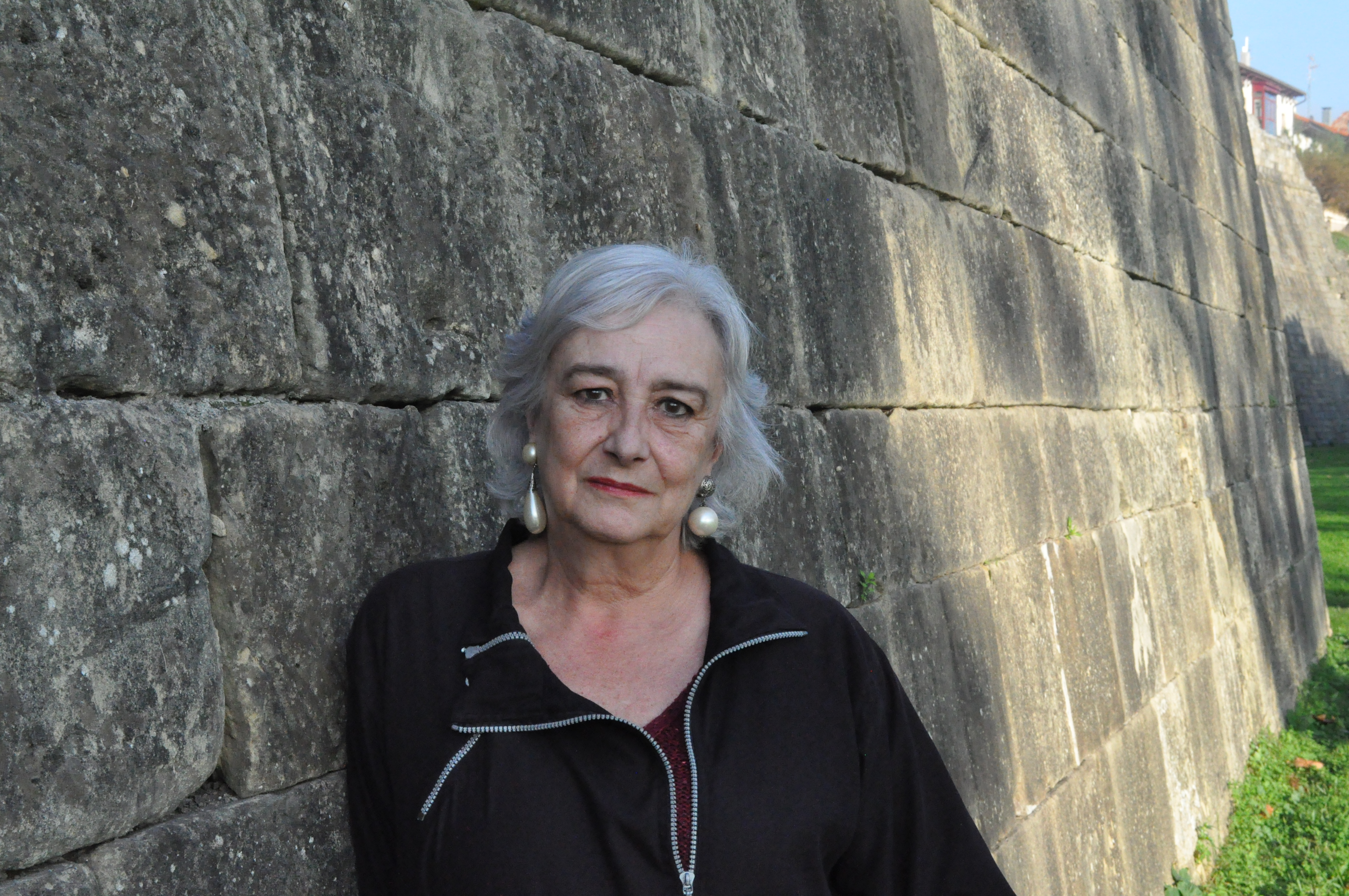 Arantxa Urretabizkaia idazlea. Argazkia: Pamiela argitaletxea